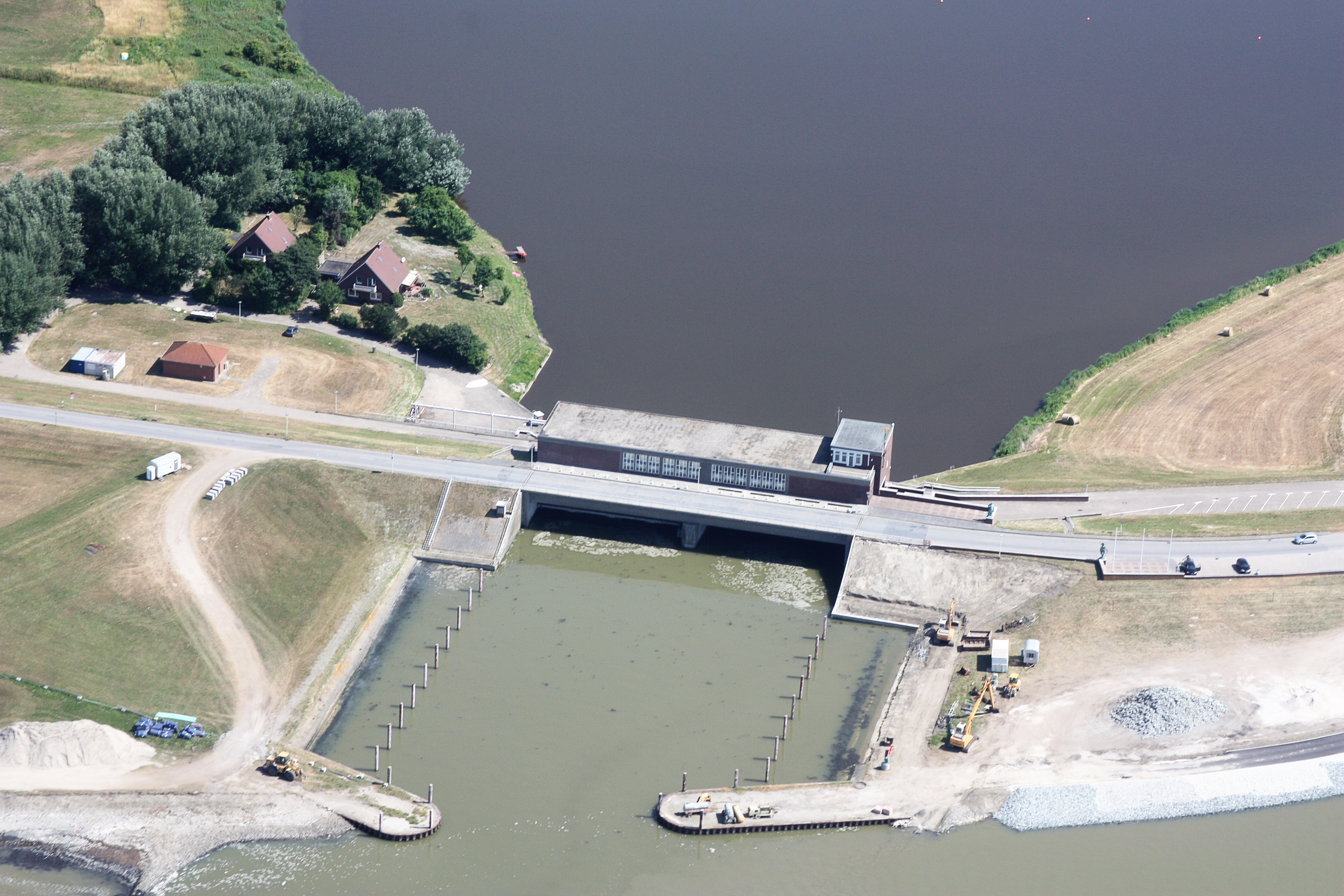 Flug von Emden zum Pilsumer Leuchtturm; Flughöhe 1500 ft; Juli 2010; Originalfoto nachbearbeitet: Tonwertkorrektur und Bild geschärft mit Hochpassfilter